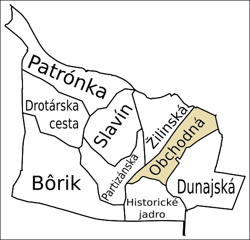 Oblasť Obchodná, Staré Mesto, Bratislava